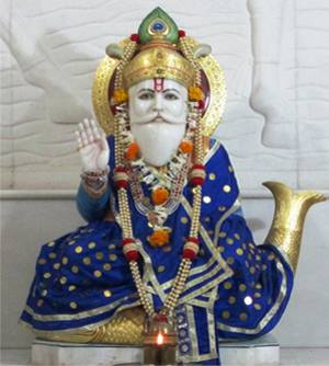 Lord Dariyalal. Dariyalal Temple, Mandvi